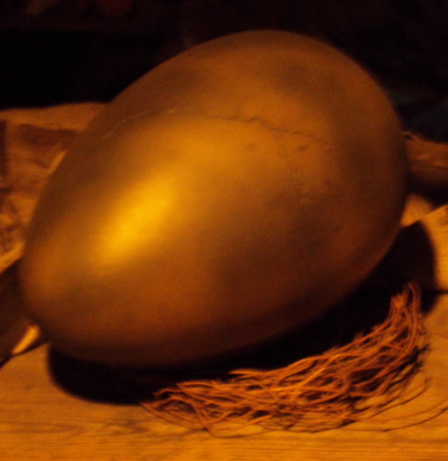 Ei van Norbert(a) tijdens Harry Potter: The Exhibition in Brussel (België)